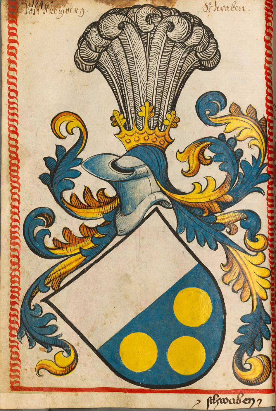 Scheibler'sches Wappenbuch, älterer Teil Freiberg